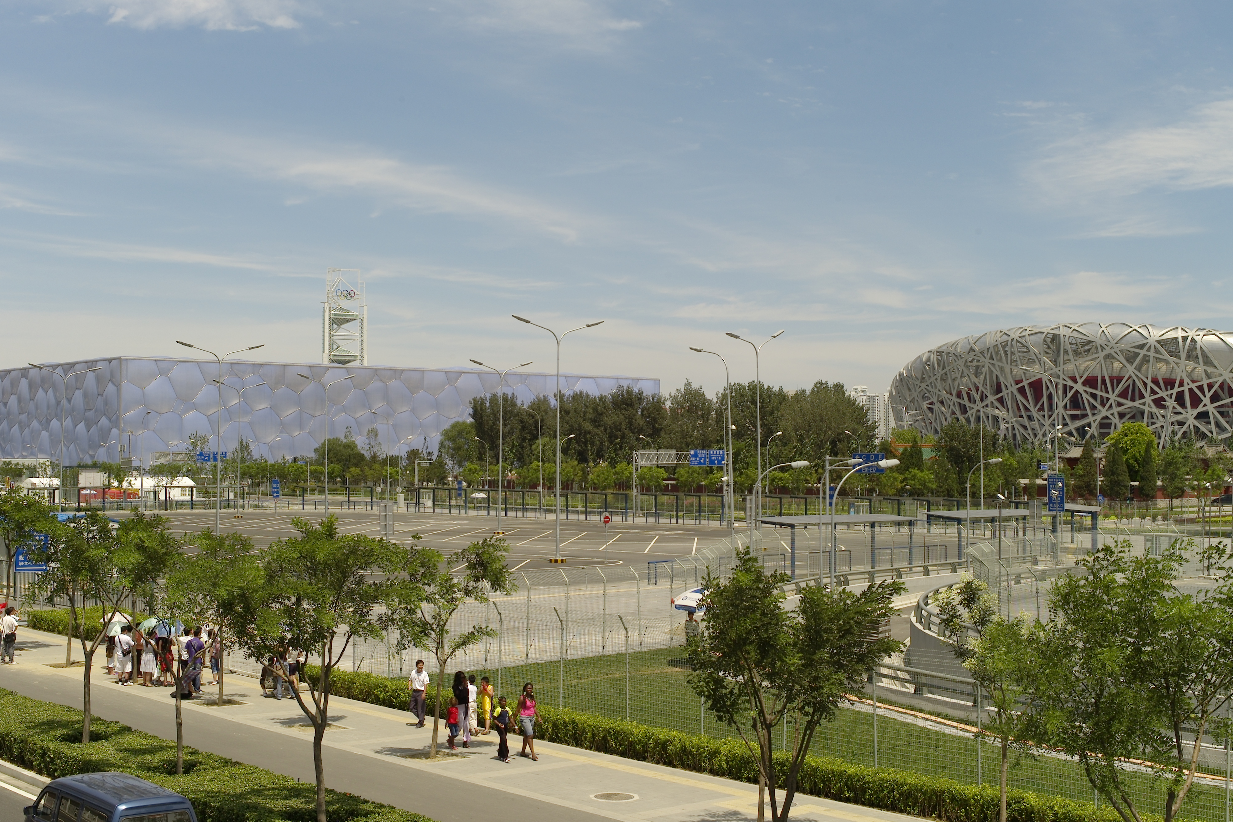 这是北京奥运会的主体育场“鸟巢”和游泳馆“水立方”的合影